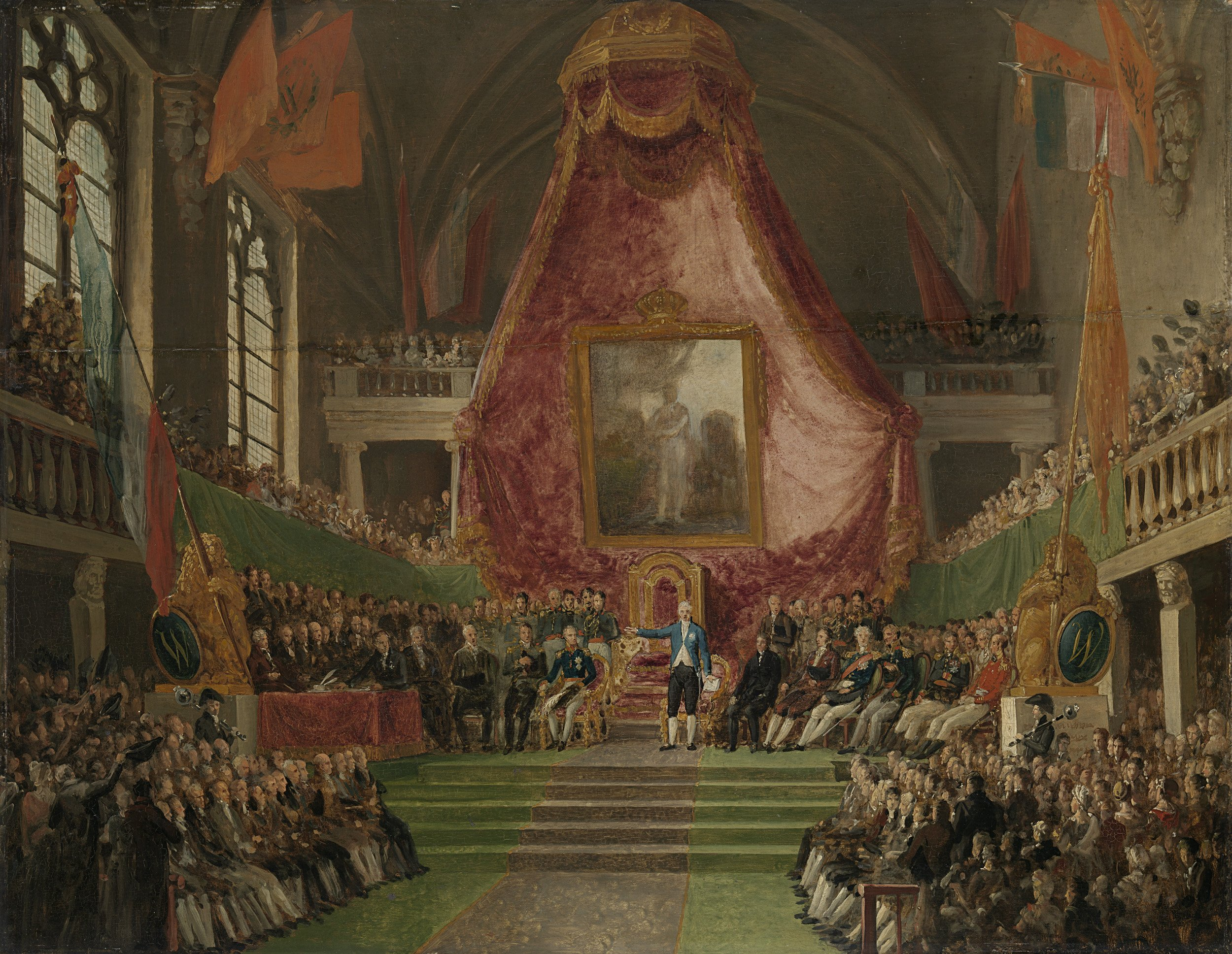 De plechtige installatie van de Universiteit van Gent door de prins van Oranje (later koning Willem I) in de troonzaal van het stadhuis op 9 oktober 1817. Gezicht in het interieur van het stadhuis van Gent waar een grote groep mensen is verzameld voor het bijwonen van de plechtigheid. Op een verhoging zitten de kroonprins en de andere belangrijke gasten, hierboven een groot schilderij onder een baldakijn. Aan weerszijden van het podium staan twee leeuwen opgesteld met een lans met vaandel en schild met de letter W. Voorstudie voor een groter schilderij.